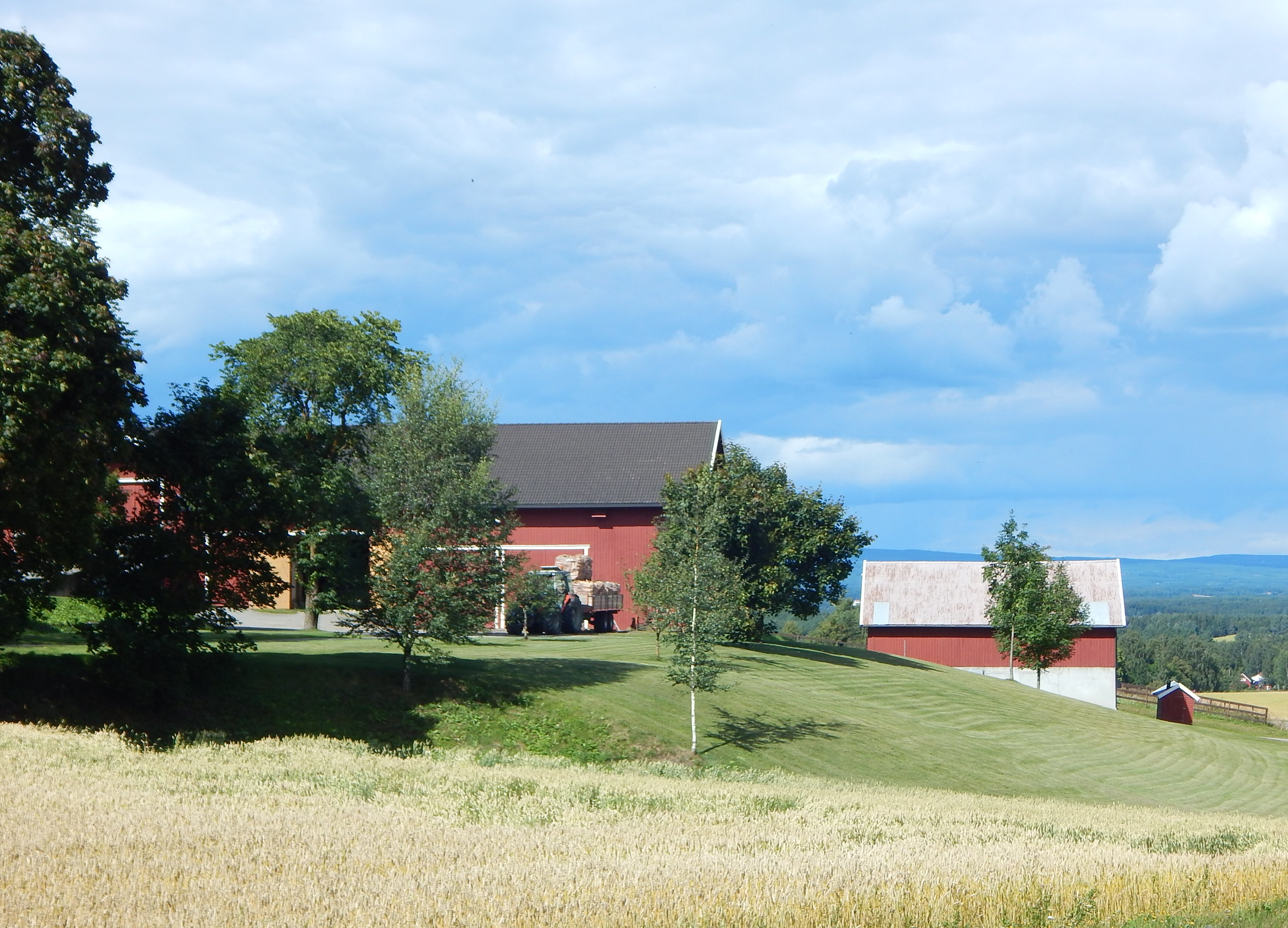 Arneberg østre i Stange kommune